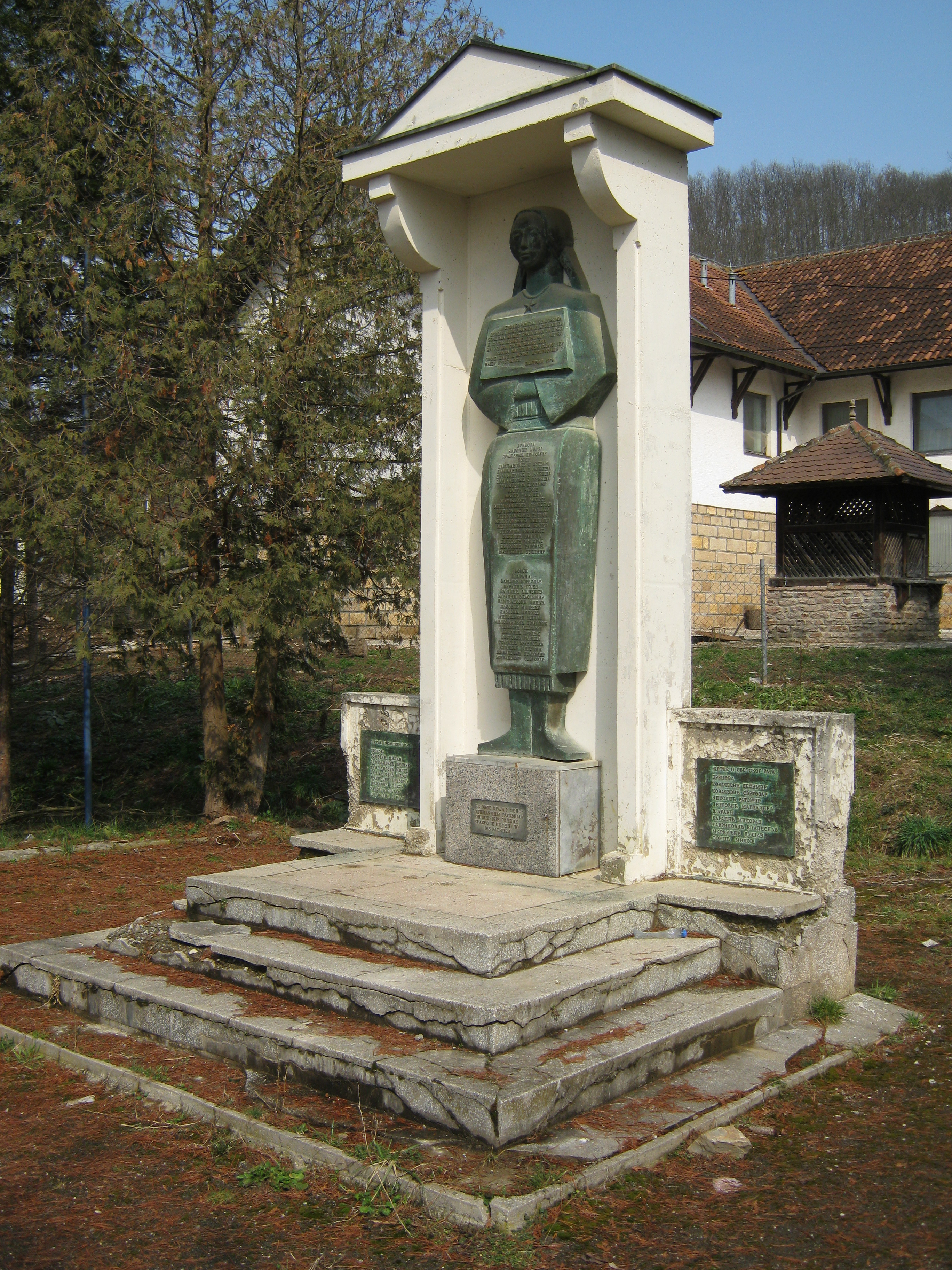 Споменик подигнут 1979. године у захвалност јунацима који су од 1912. до 1945. године дали своје животе како би будуће генерације живеле у слободној Србији.